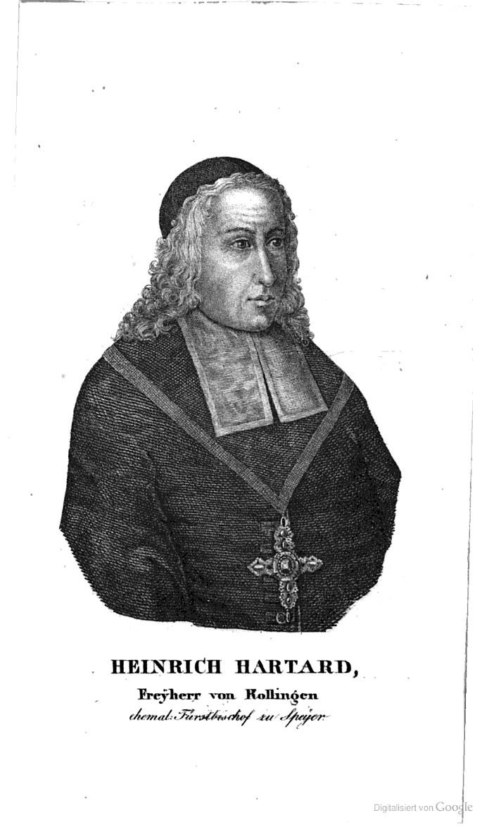 Bischof Heinrich Hartard von Rollingen, Speyer